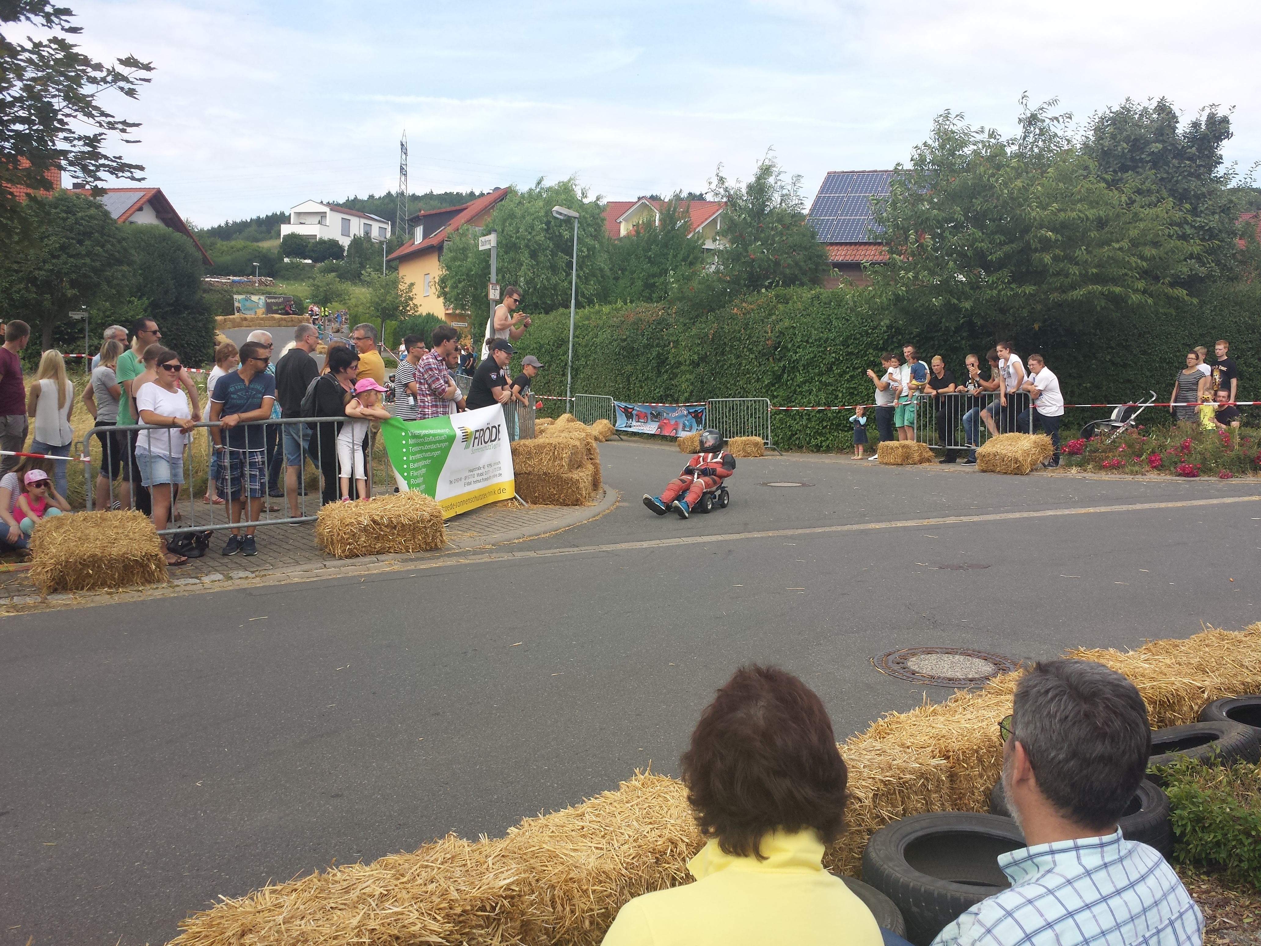 1. Badische Big-Bobby-Car Meisterschaft in Tauberbischofsheim am 16. und 17. Juli 2016. Veranstaltet vom BCSC Tauberbischofsheim. Meisterschaftslauf mit Weltranglistenwertung. Es handelt sich um eine etwa 500 m lange Strecke über den Stauffering und die Duderstädter Allee mit Fahrgeschwindigkeiten von bis zu 70km/h.